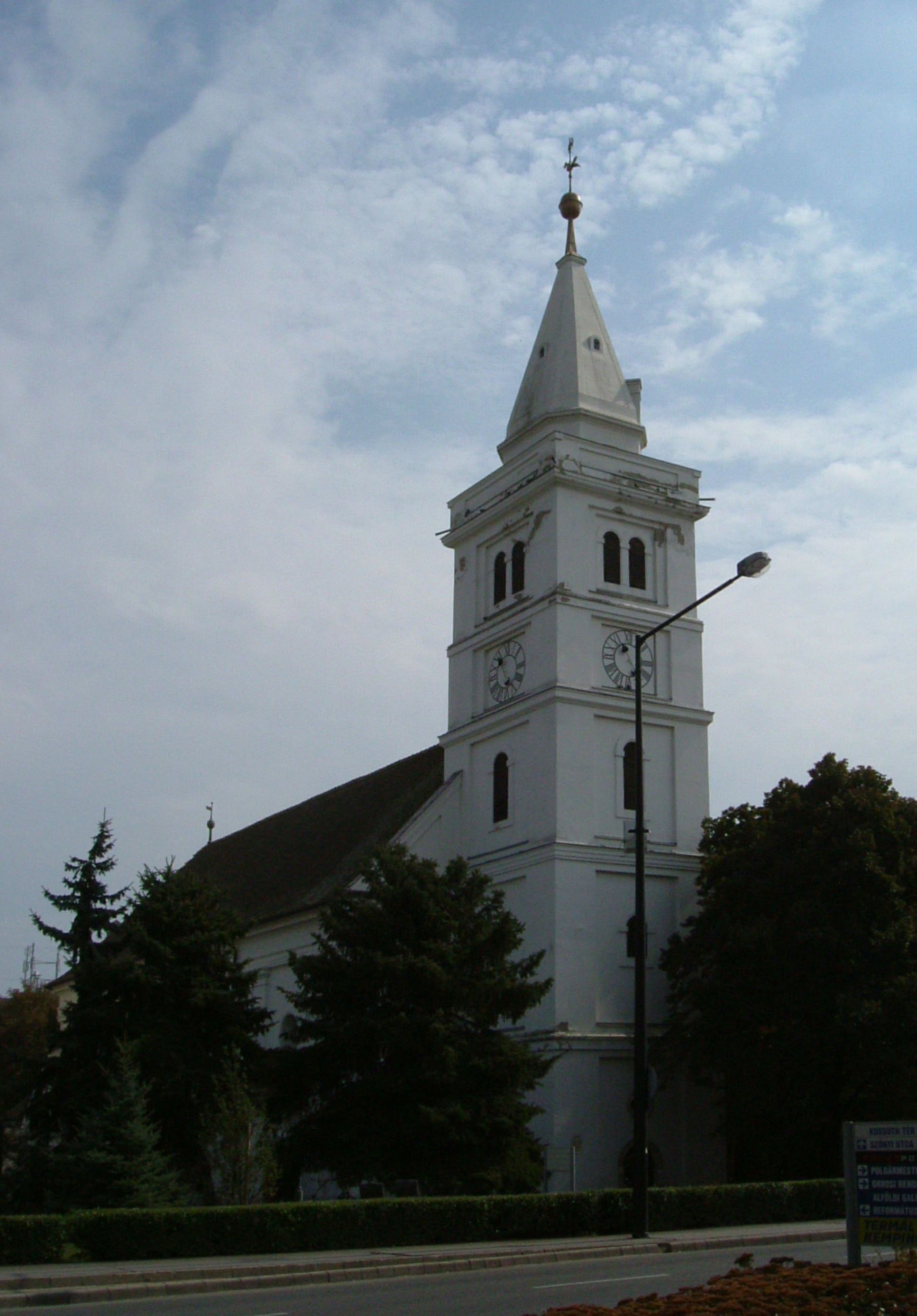 Hódmezővásárhely - Old Reformed Church